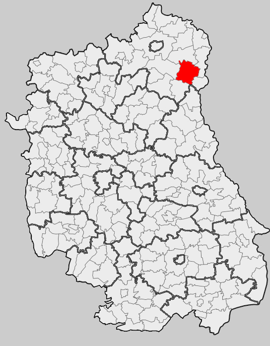 Map of gmina Tuczna, Biała Podlaska county, Lublin voivodship Mapa gminy Tuczna, powiat bialski, województwo lubelskie